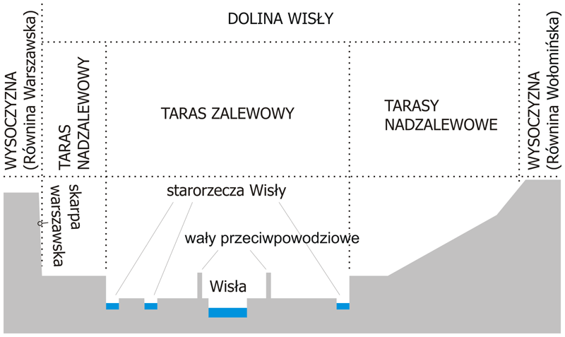 Dolina Wisły w Warszawie - bardzo schematyczny przekrój poprzeczny. Zaznaczone taras zalewowy i tarasy nadzalewowe, Dolina Wisły, wysoczyzny (Równina Warszawska i Równina Wołomińska), skarpa Warszawska, Wisła, starorzecza, wały przeciwpowodziowe.